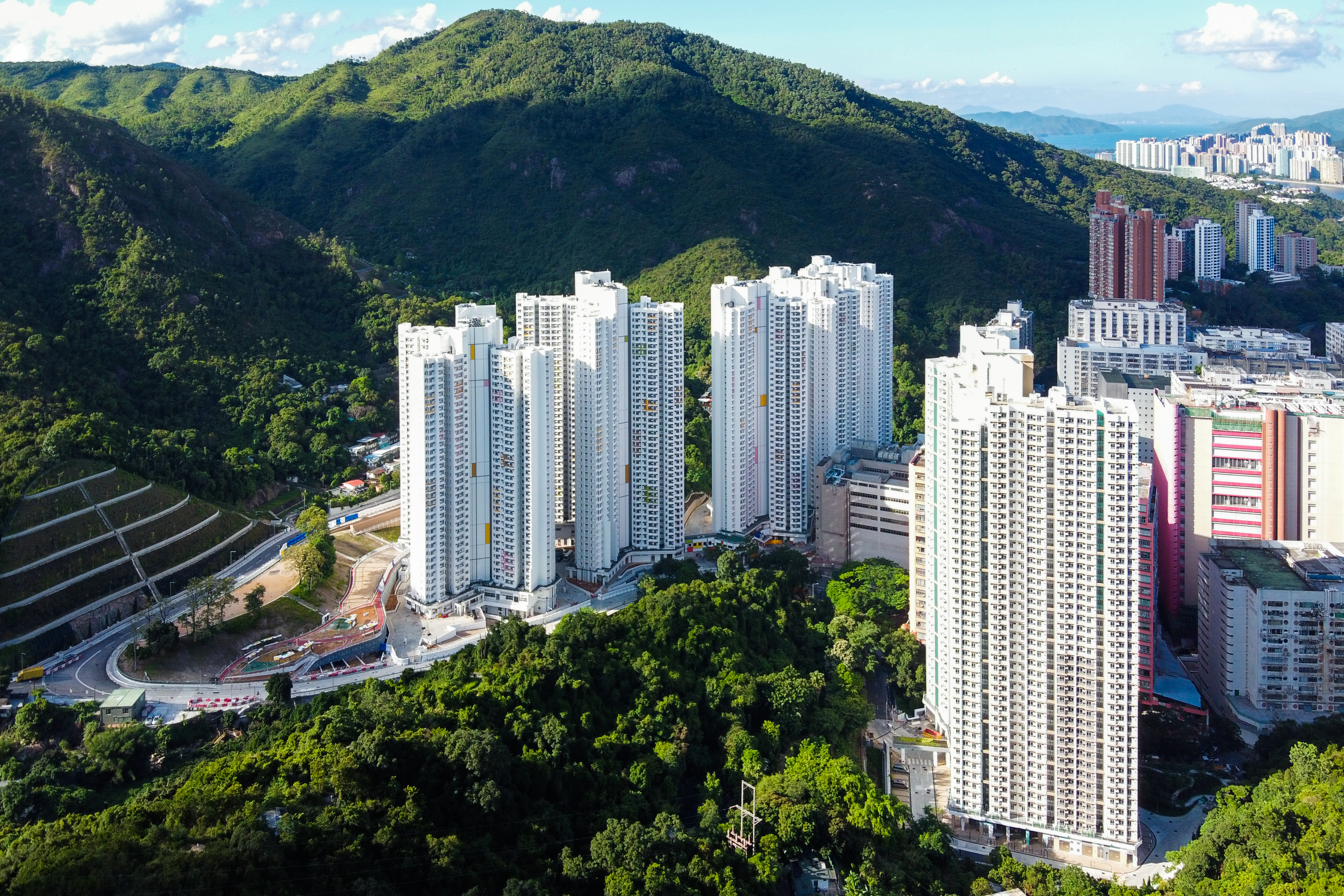 Chun Yeung Estate